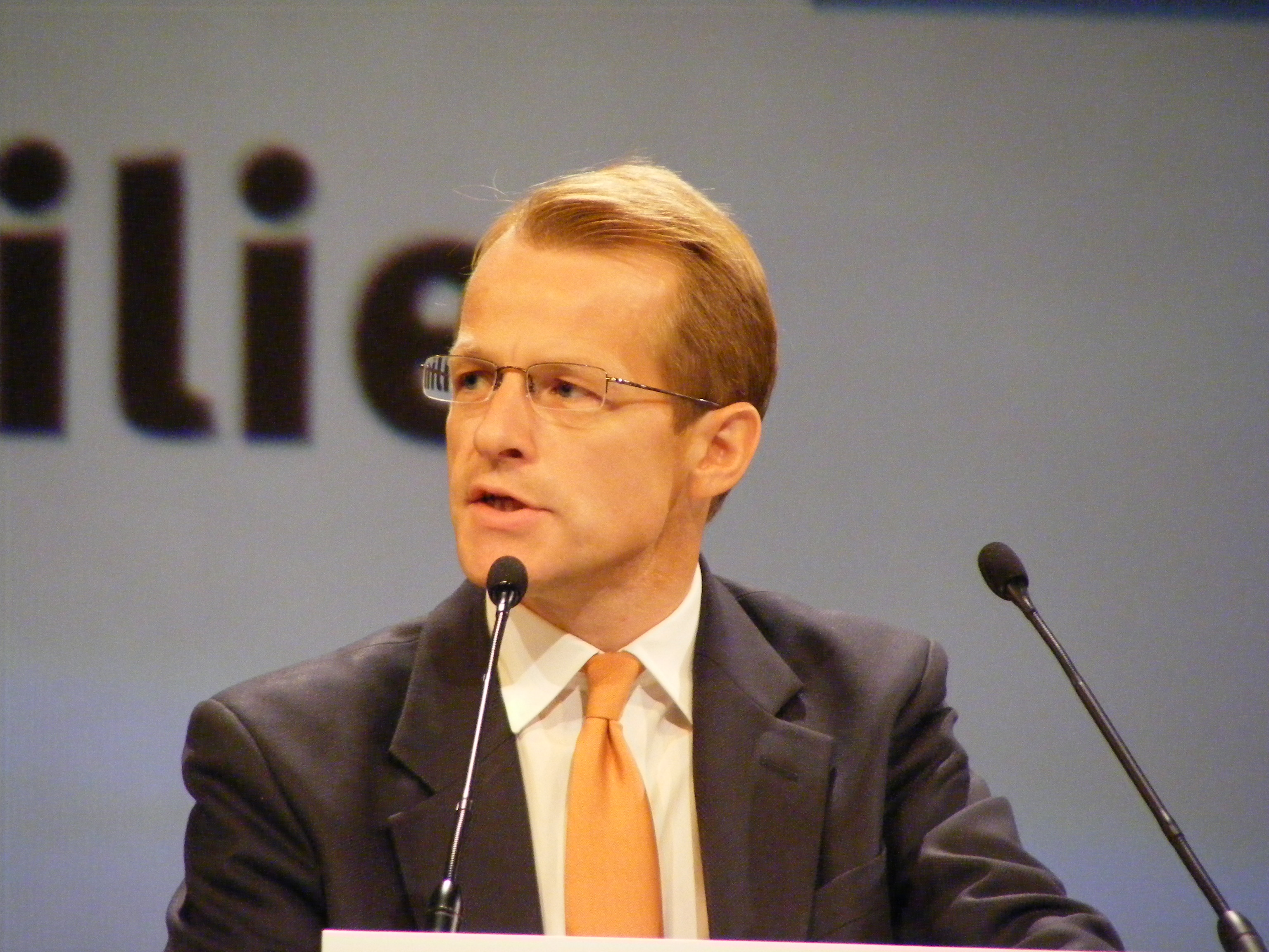 David Laws